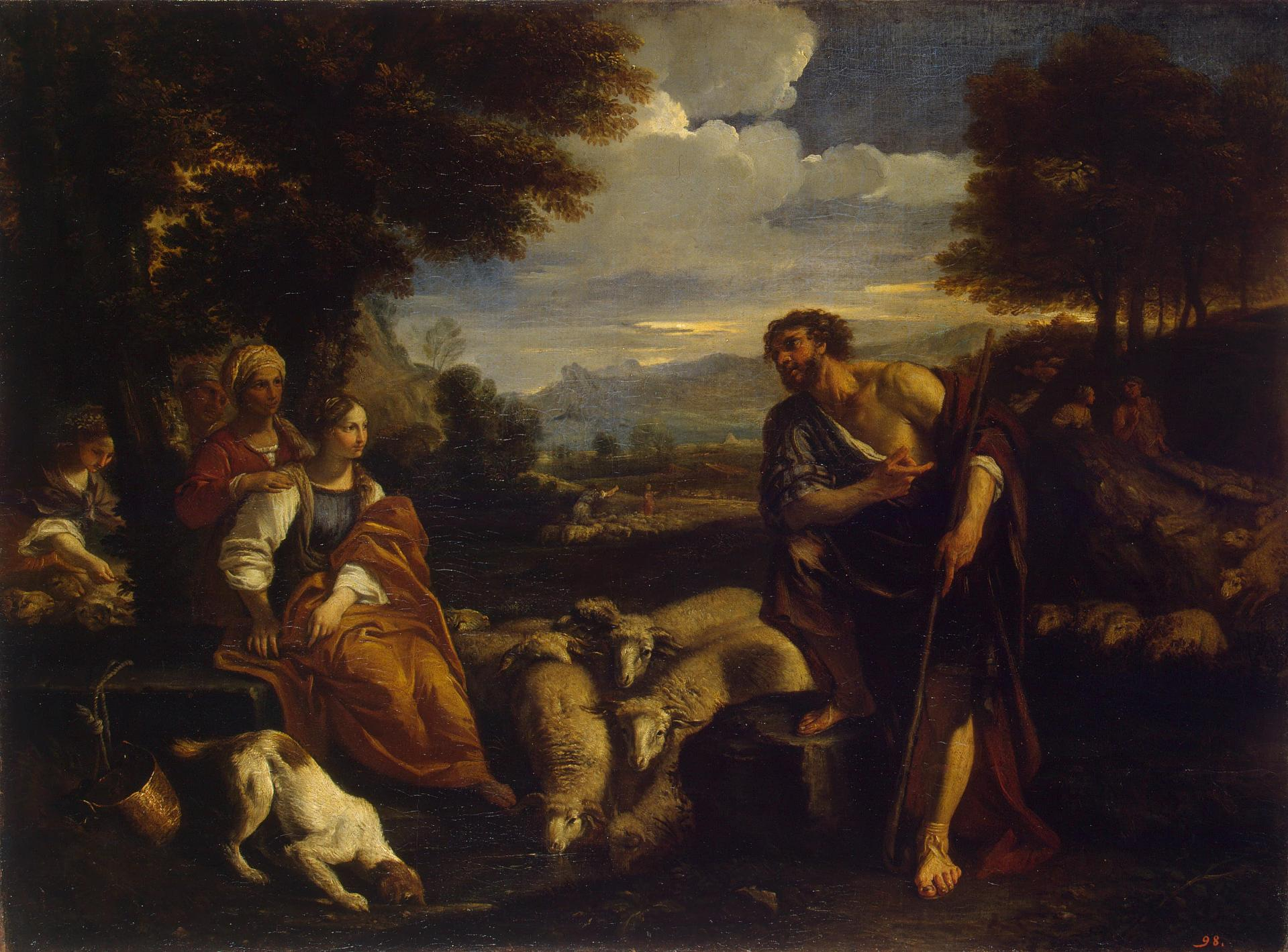 L'incontro di Giuseppe e Rachele, o/tl, 72 x 98 cm, Ermitage, San Pietroburgo